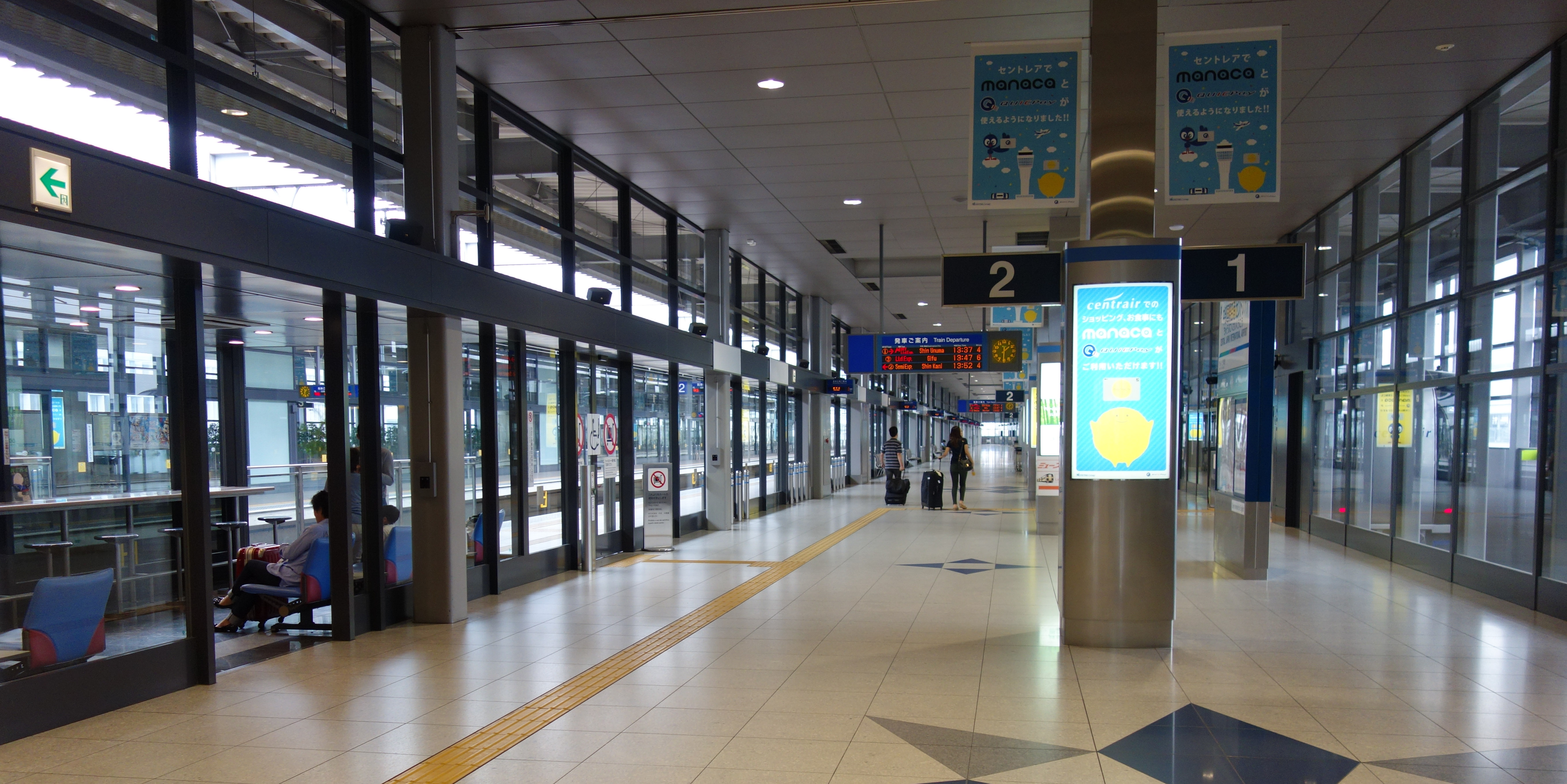 中部国際空港駅（1・2番線ホーム）